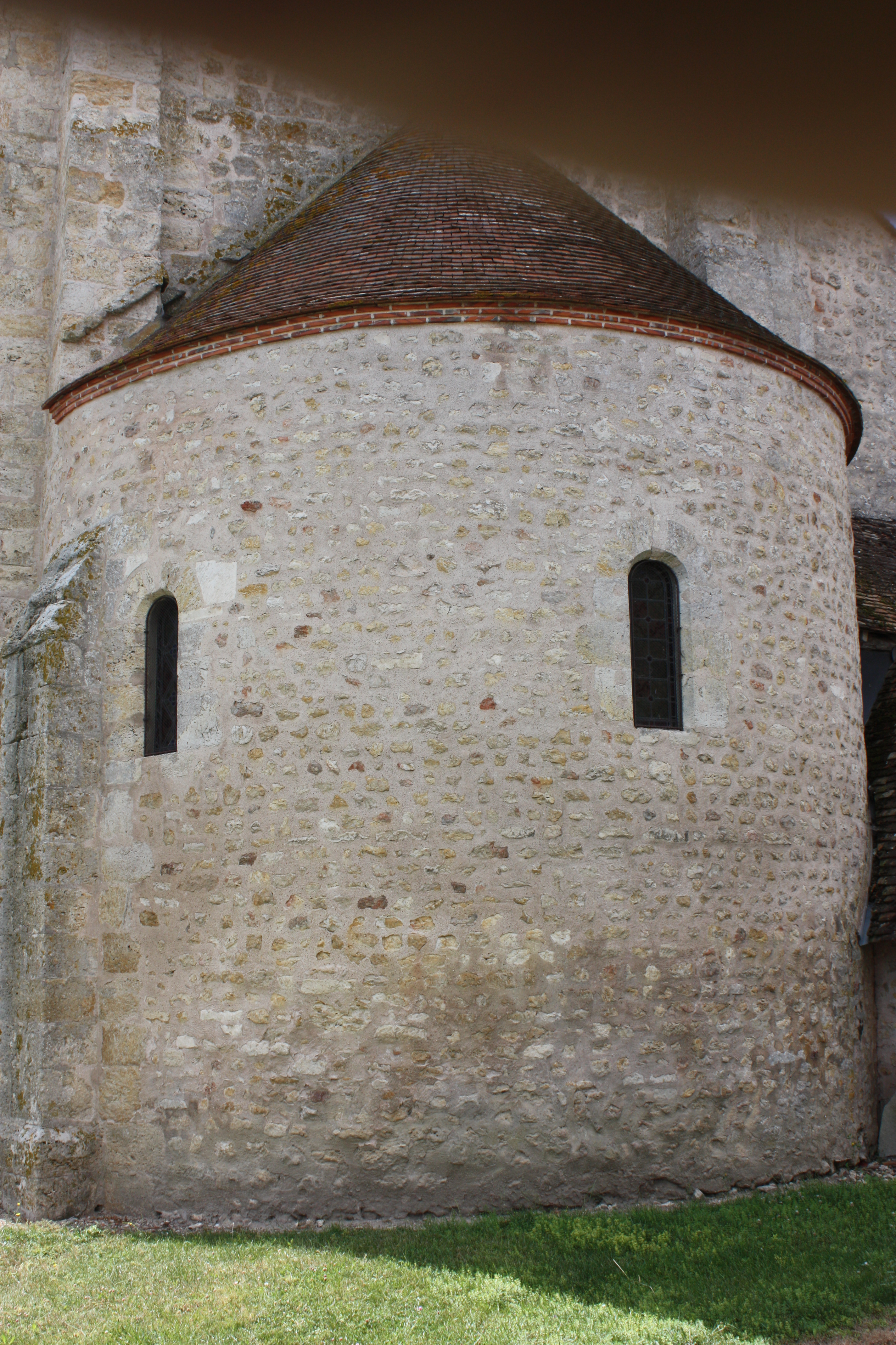 Fréville-du-Gâtinais - Eglise Saint-Martial. Abside.